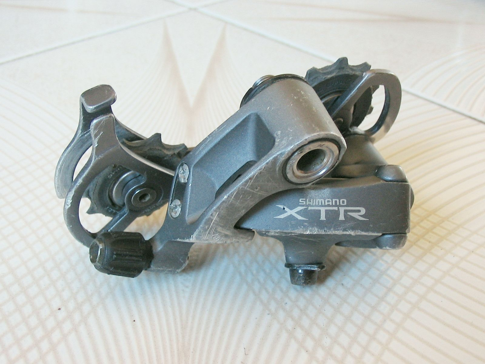 Shimano XTR rear derailleur